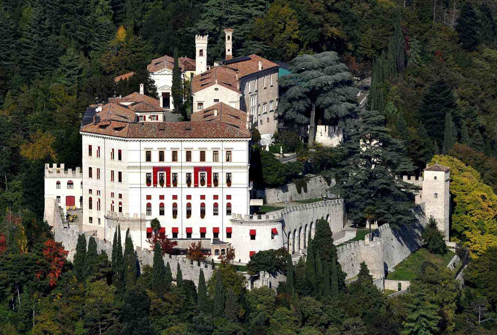 Castelbrando cison di valmarino foto aerea